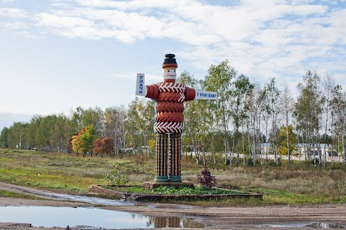 рокао